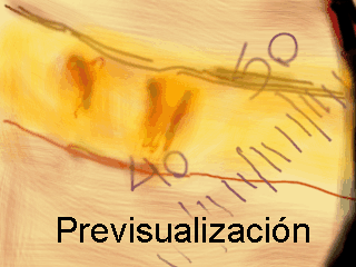 Esta imagen de dominio público enlaza a esta imagen del artículo inglés sobre el sudario de Turín. Esta imagen sirve tanto para franquear las incompatibilidades entre las políticas de ambas wikipedias, como para informar al lector de que la imagen enlazada no es de libre uso.